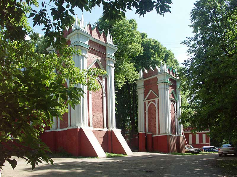 Башни усадьбы "Михалково"